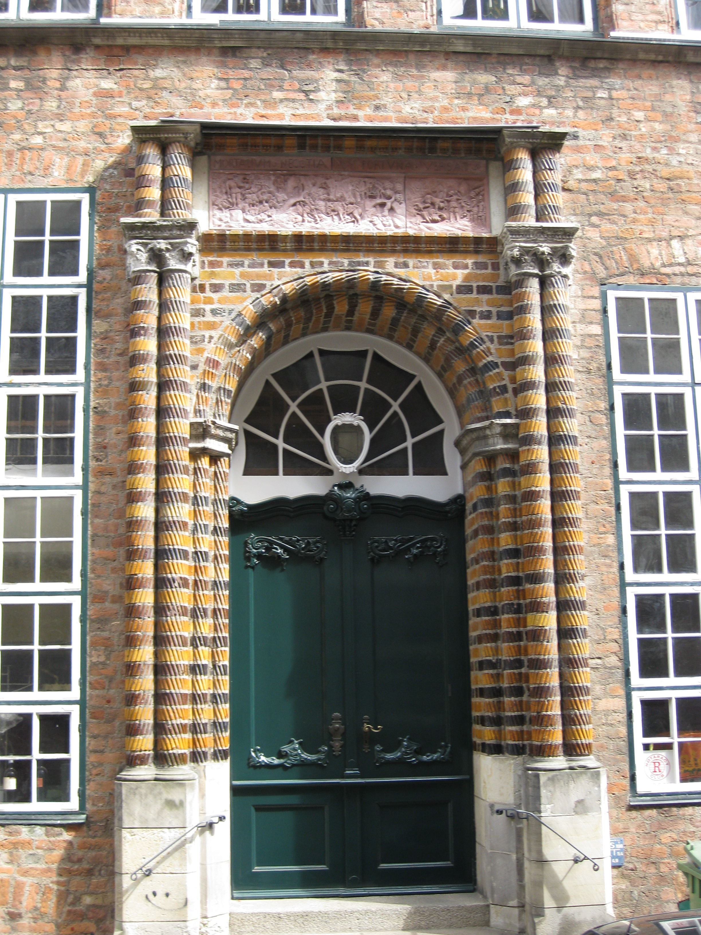 Nach dem Zweiten Weltkrieg wurde das Renaissanceportal vom ansonsten zerstörten Haus des Ratsherrn Johann Glandorp (1556–1612) aus der Fischstraße 34 in die Mengstraße 50 umgesetzt. Die Terrakotten darüber stammen aus der Werkstatt des Statius von Düren.